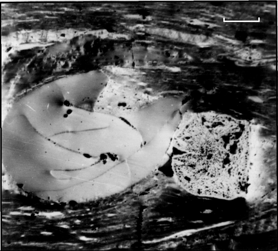 Секретиніт